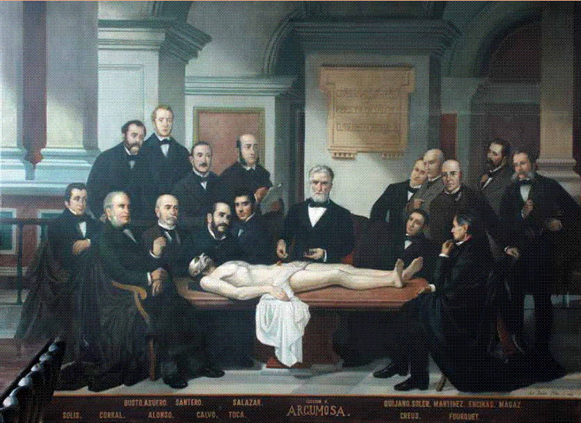 Copia del lienzo pintado por Antonio Bravo en 1885, expuesta en la Facultad de Medicina de Santander. Donde sale el cirujano cántabro del siglo XIX Diego de Argumosa con otros cirujanos españoles.